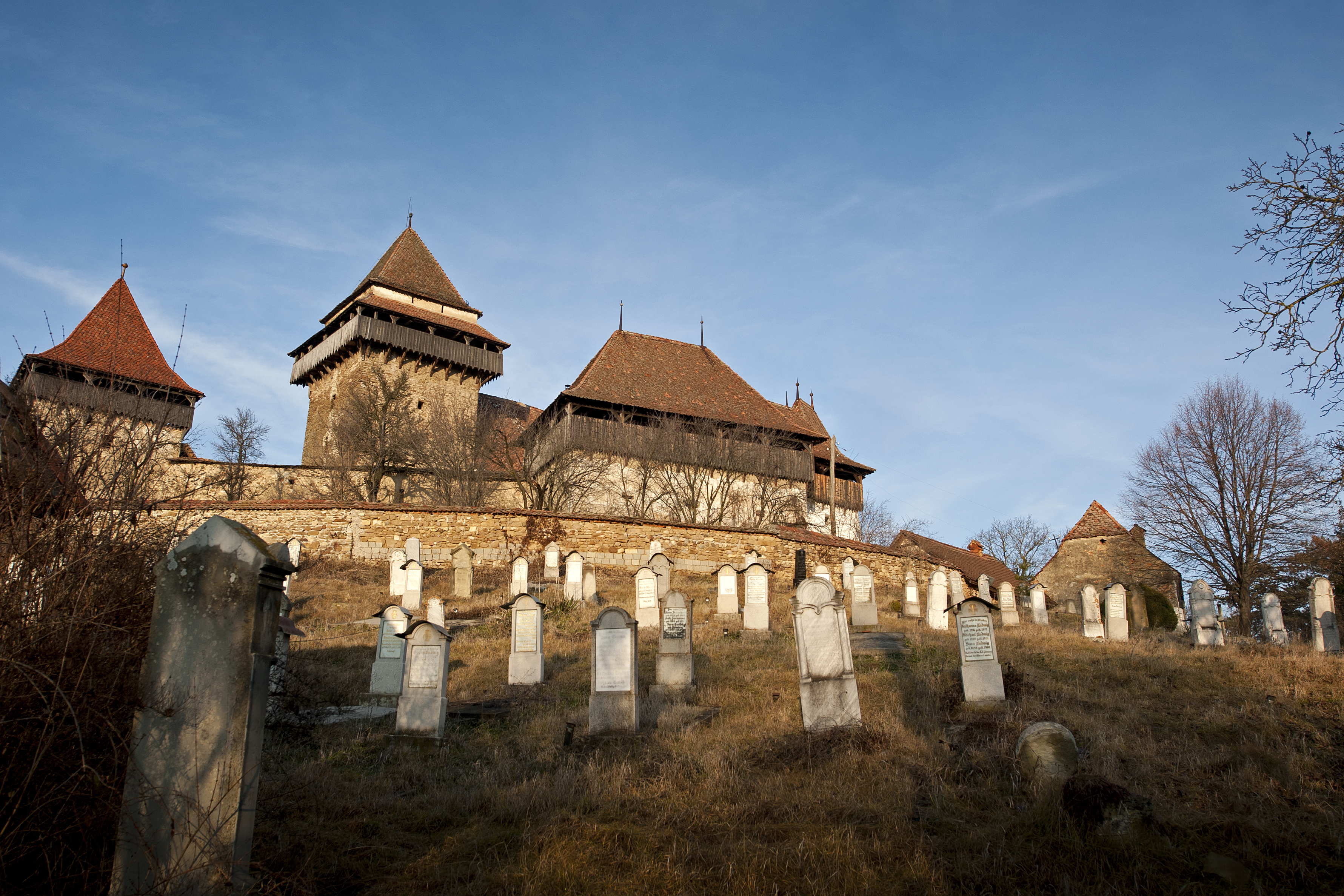 Cimitir evanghelic 04